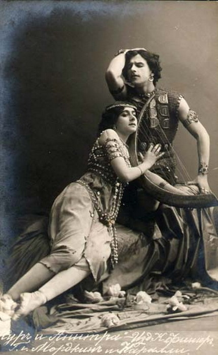 Вера Каралли